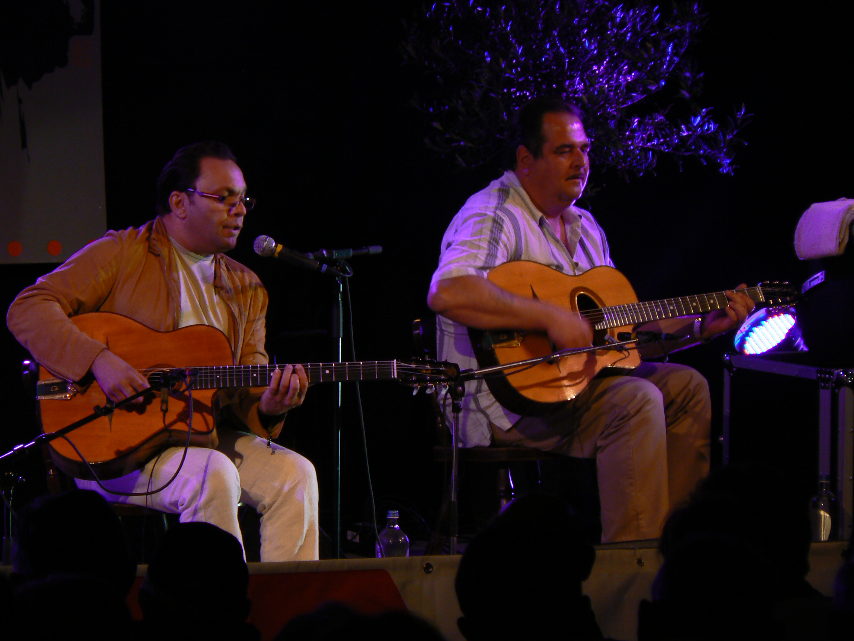 L'ensemble Manouche Biréli Lagrène Gipsy Project au Jazz & Blues Festival de Gouvy 2008